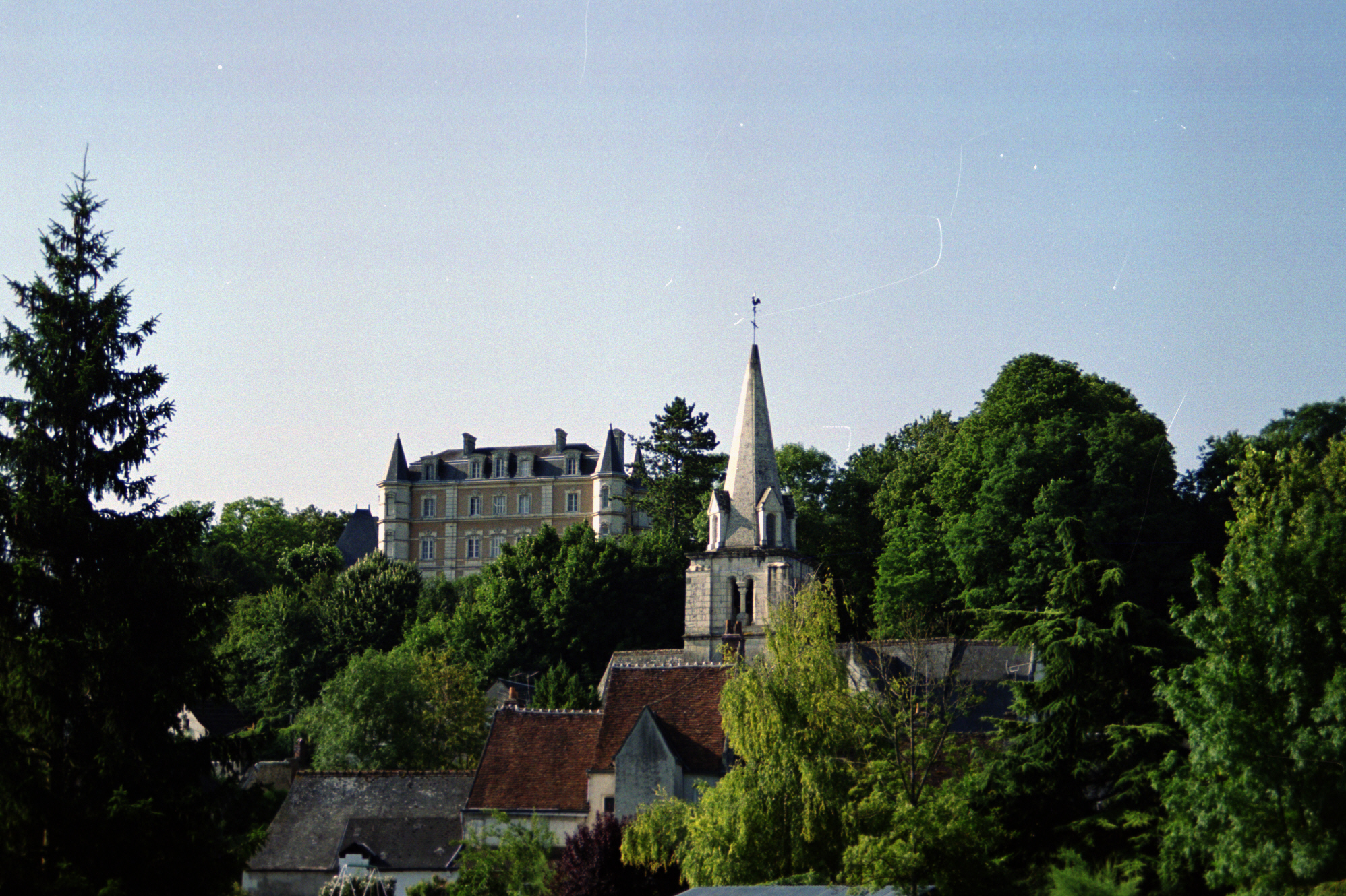 Photo prise du bord du Cher, dans le petit parc de détente et de sport.